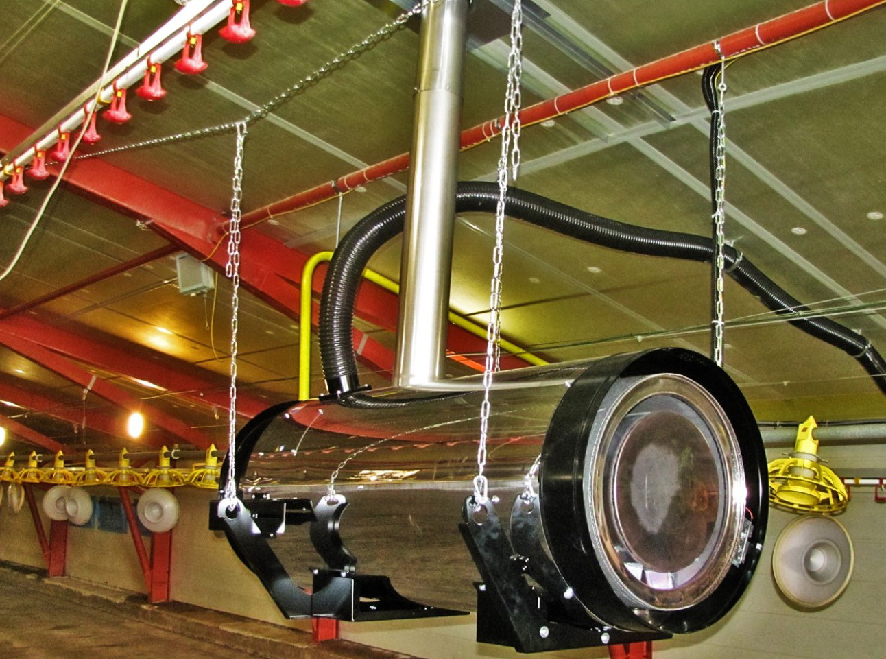 Kéményes mobil, baromfi ól fűtő mobil hőlégfúvó. Mivel kéményes így az ólba csak a tiszta meleg levegő kerül befúvásra. Külső égési levegő beszívására alkalmas a készülék.